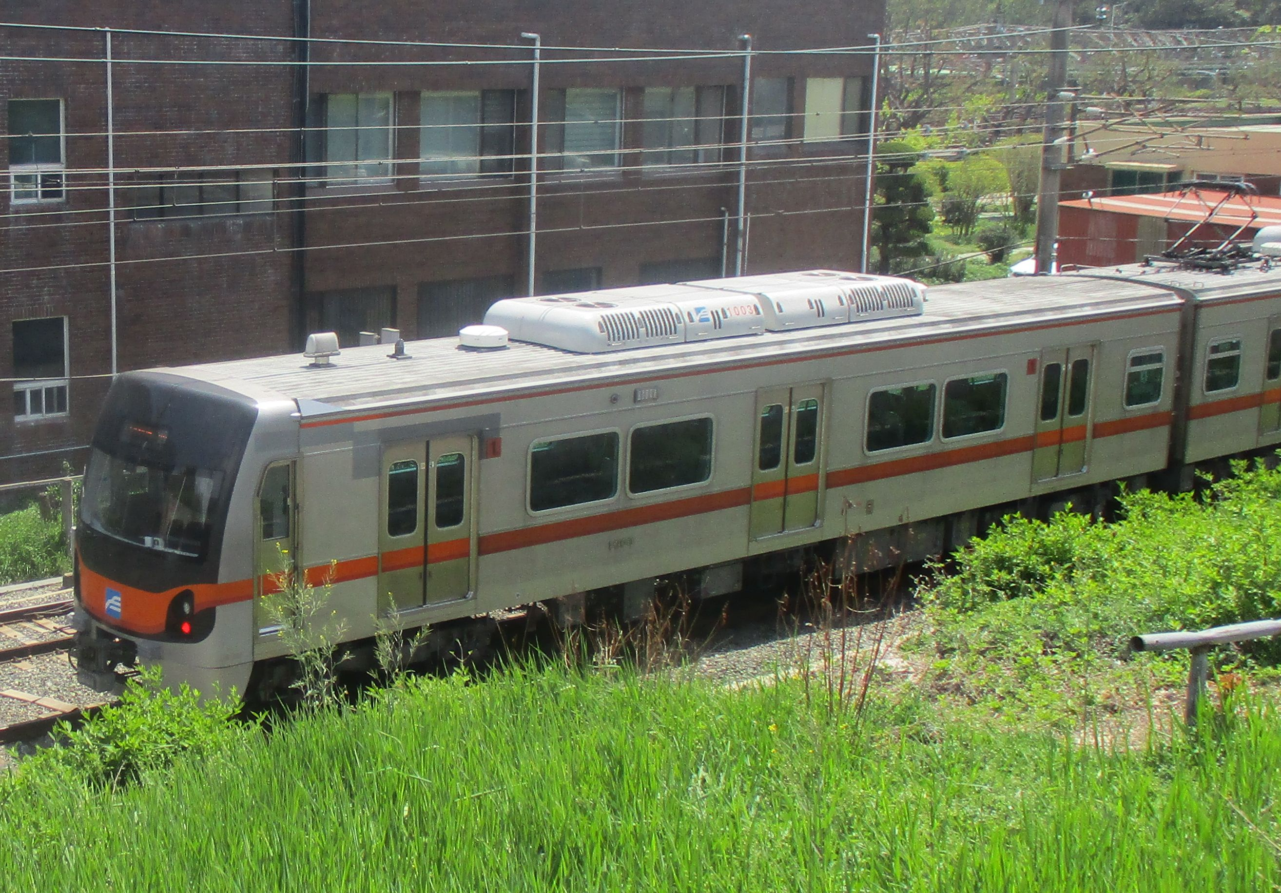 釜山交通公社1号線 新1000系電車